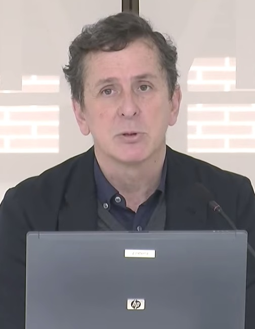 Rafael Moneo. Museo Universidad de Navarra